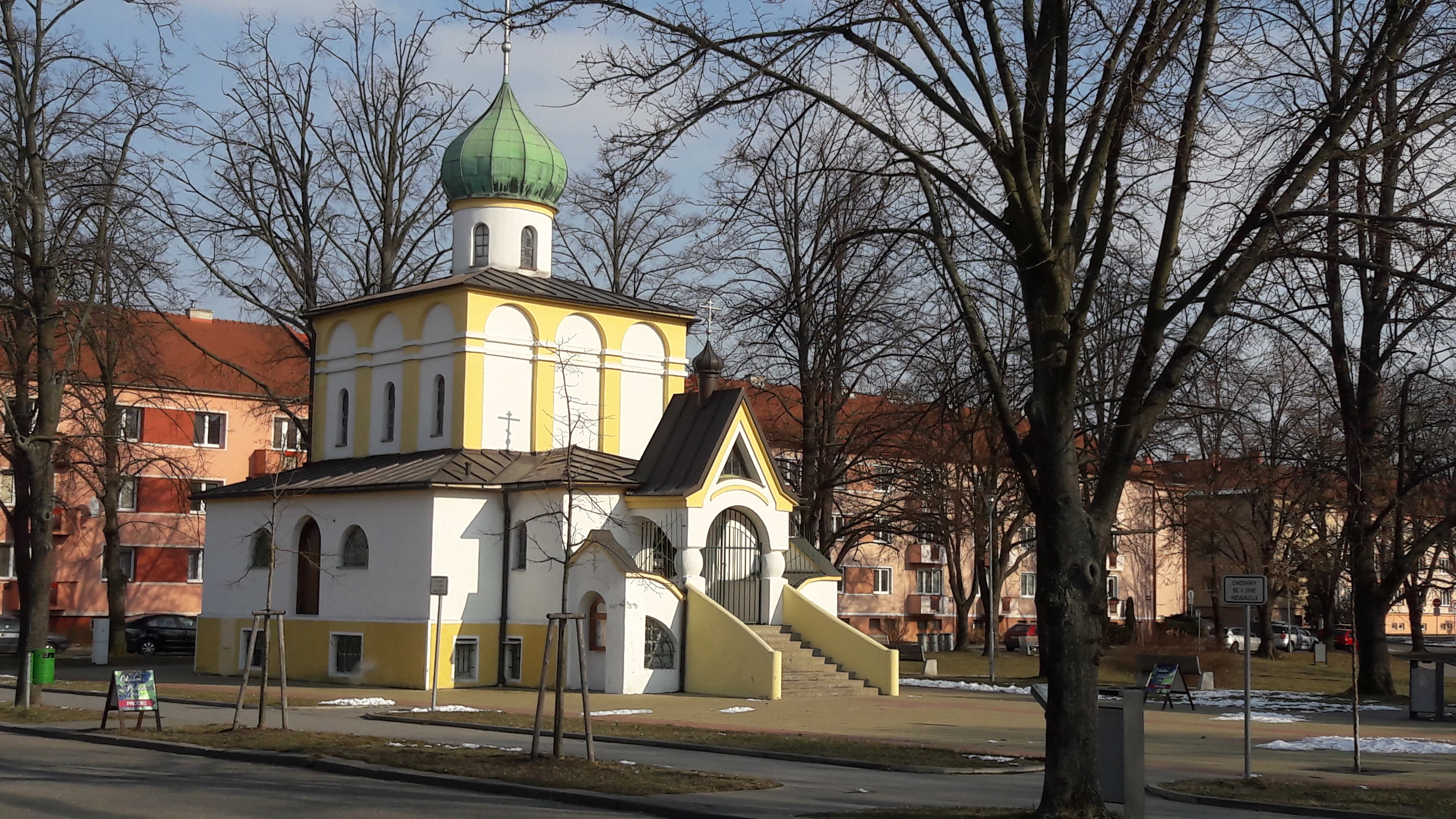 Chrám svatého Cyrila a Metoděje v Kroměříži